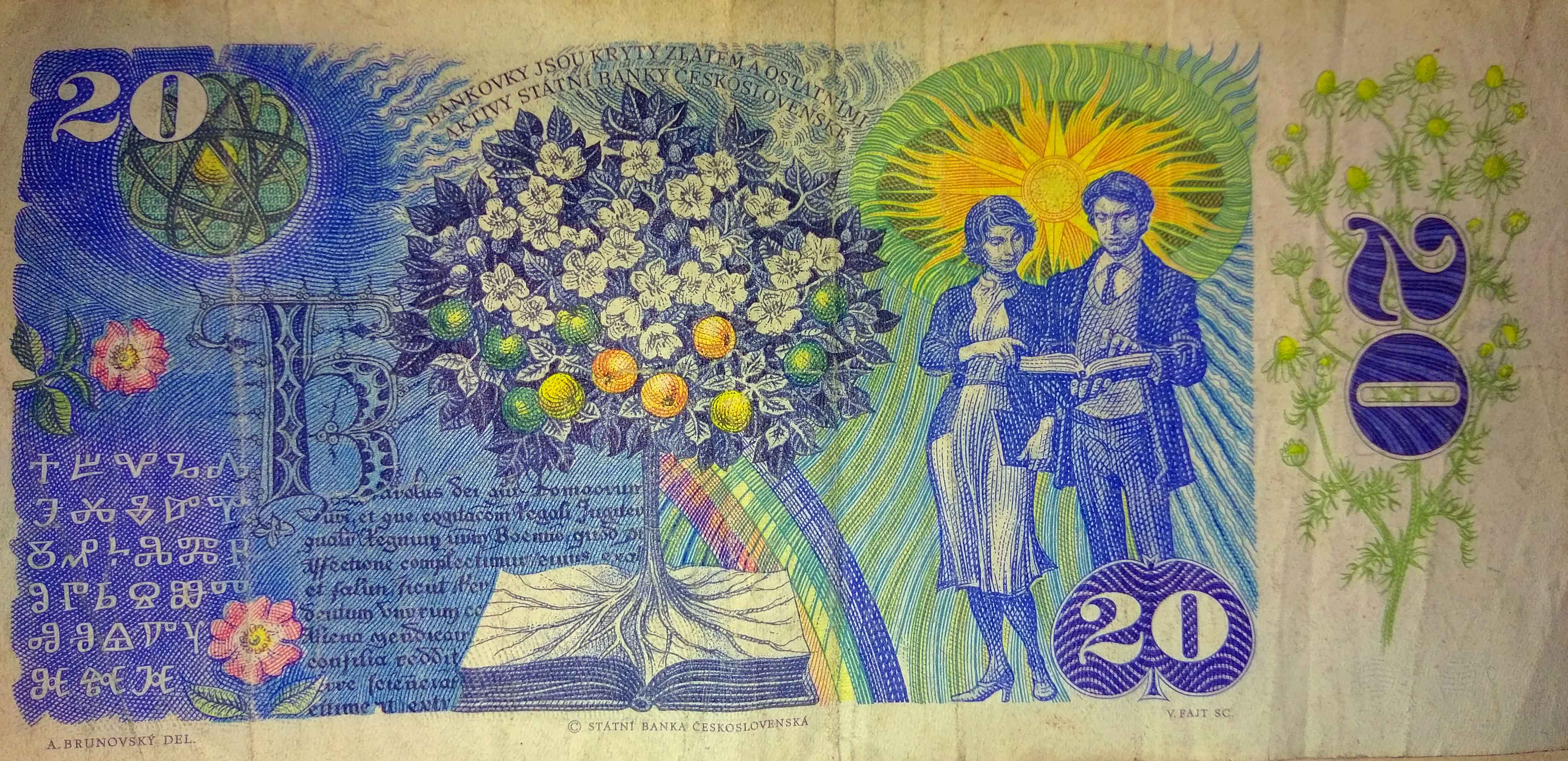 Op het laatste twintigkronen biljet van Tsjecho-Slowakije staat op de achterkant 30 van de 41 tekens van het glagolitisch alfabet. Dit biljet is slechts van 1 oktober 1988 tot 31 juli 1993 in omloop geweest.